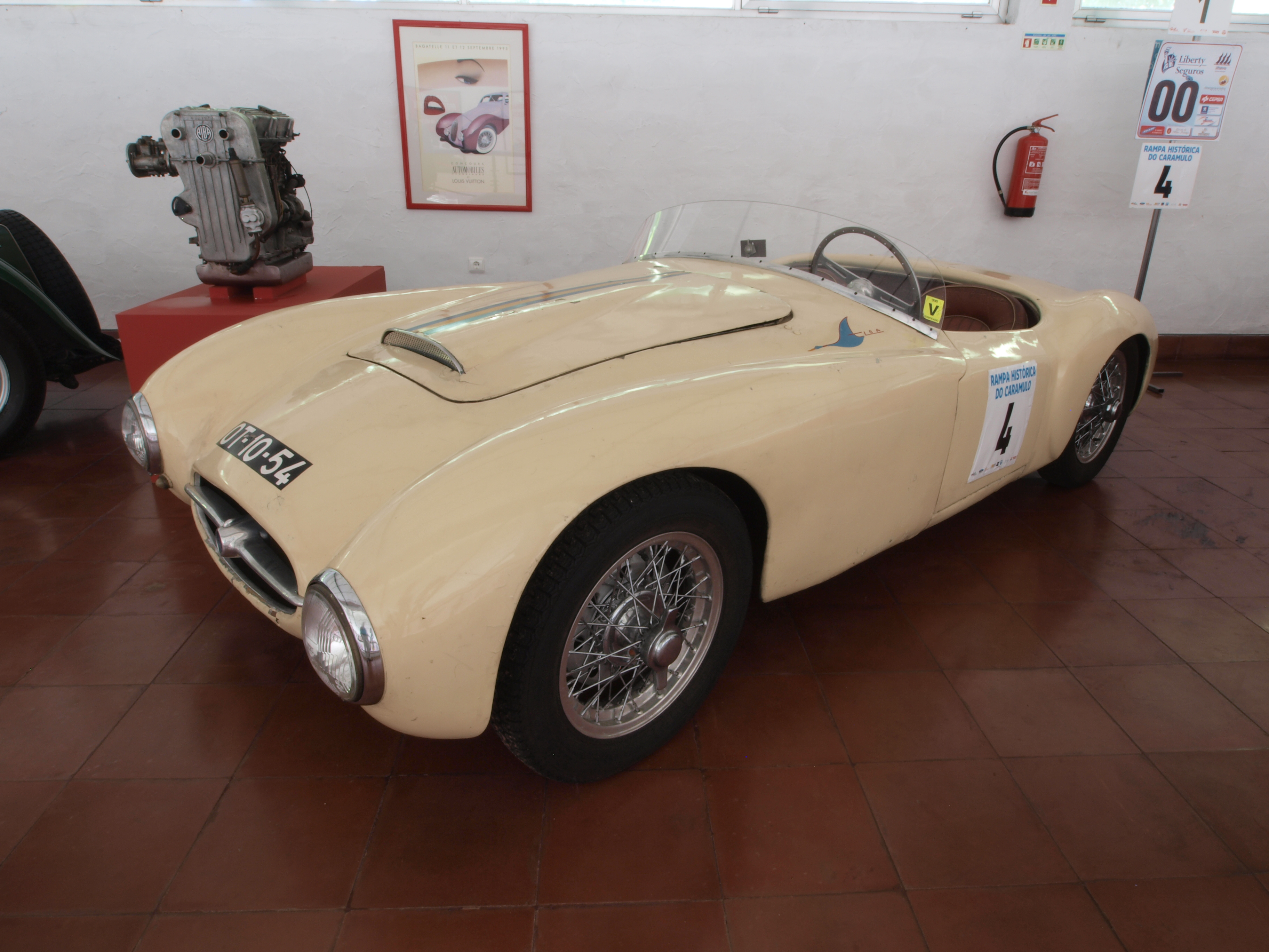 Photographed at the Caramulo museum, 'Museu do Caramulo', Caramulo, Portugal. OLYMPUS DIGITAL CAMERA